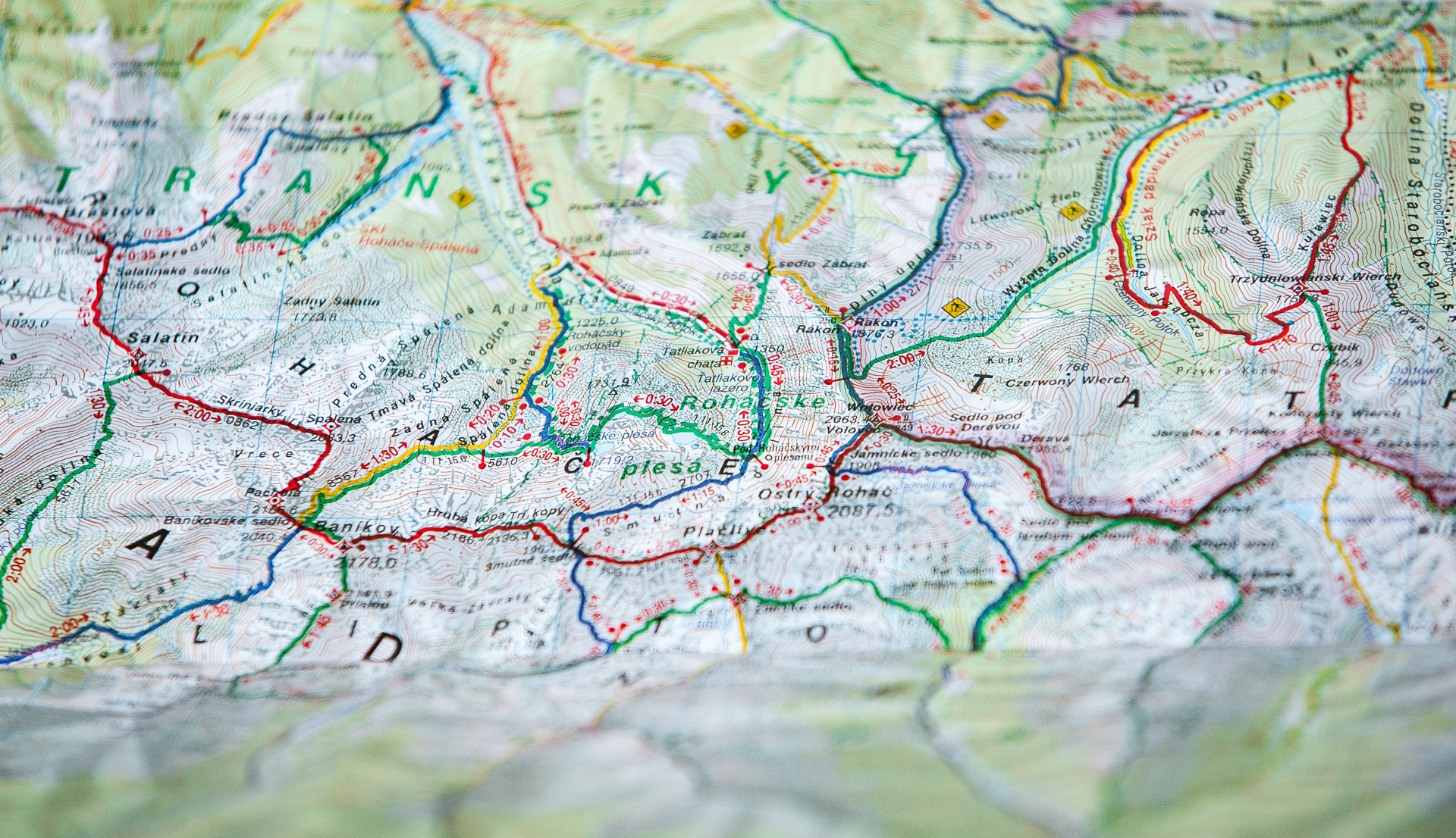 Detail tradičného dizajnu a grafického spracovania turistickej mapy VKÚ Harmanec v mierke 1:50 000.